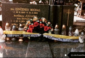 Náhrobok Zinčenka M.L na cintoríne Dubnica nad Váhom